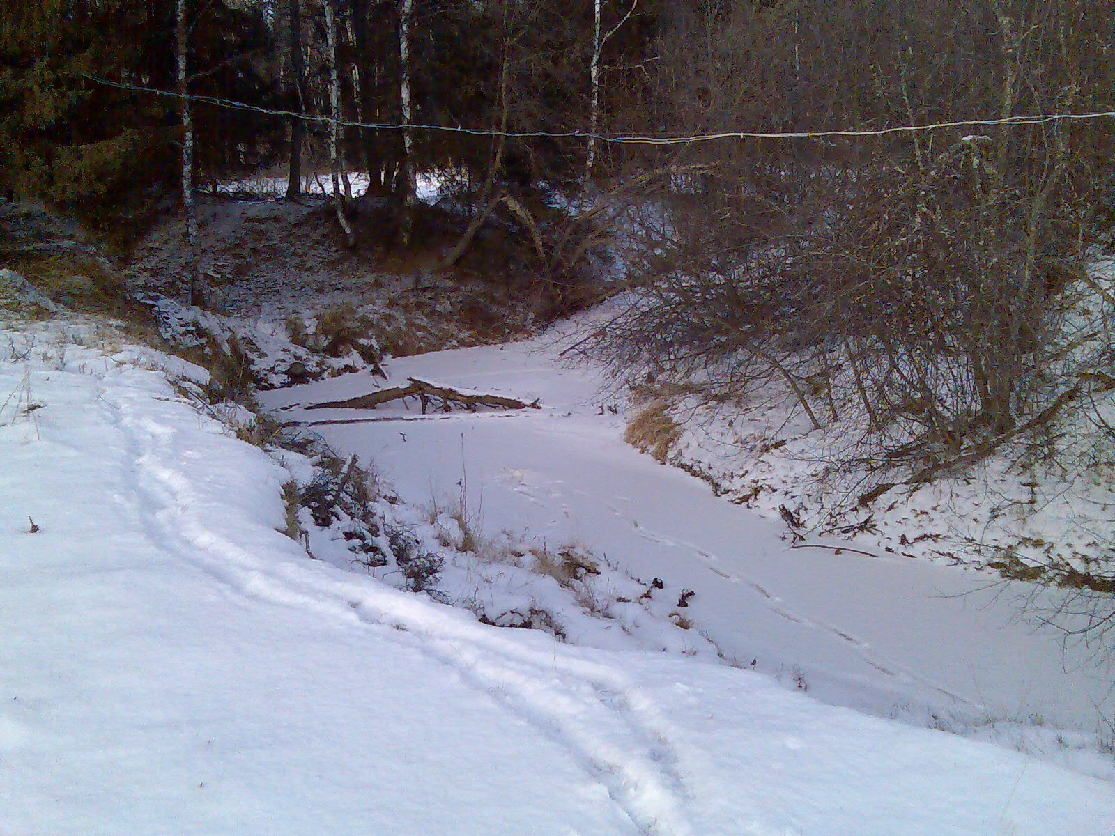 Речка Тирлян